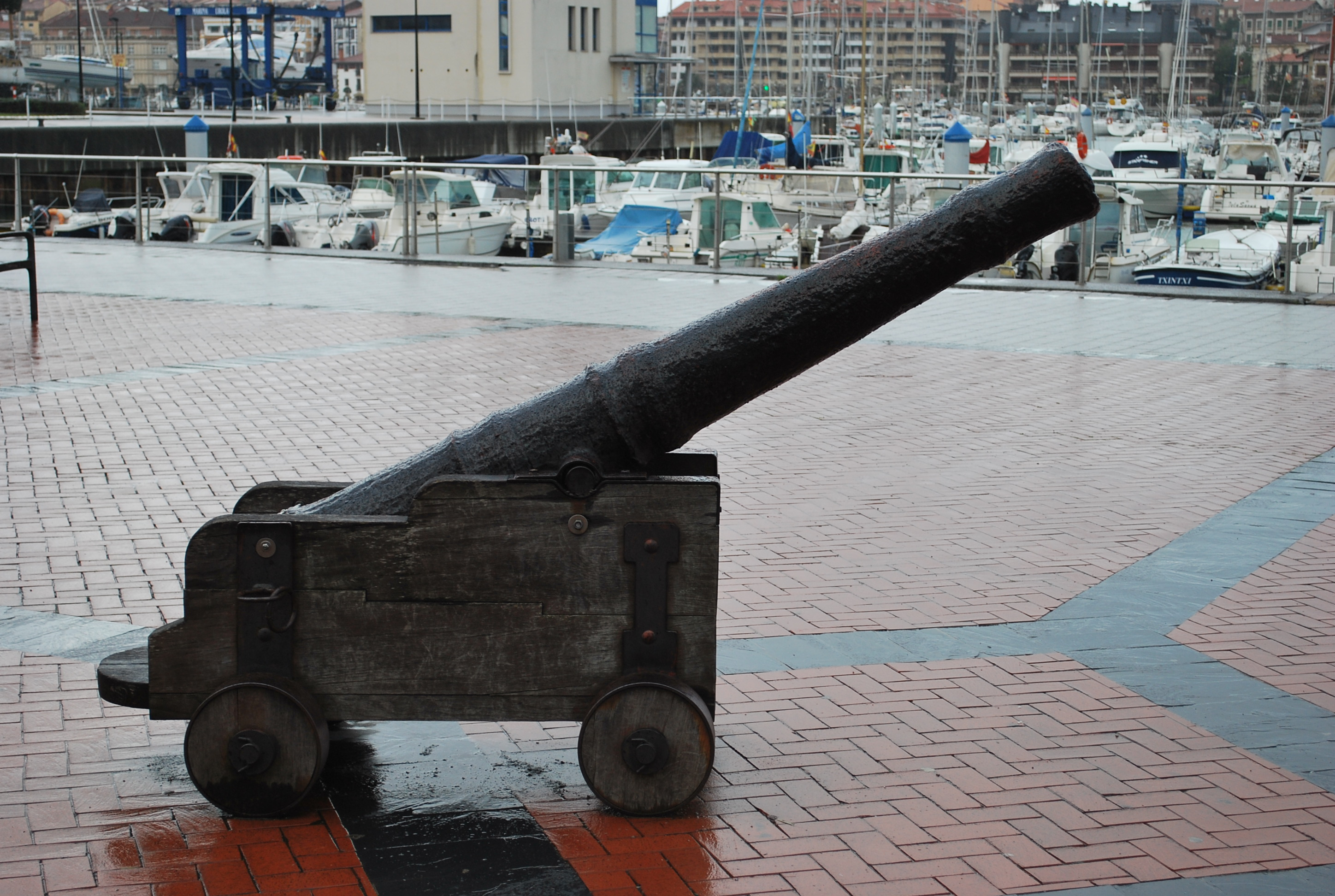 Canons sur le port de Zumaia (Guipuscoa).